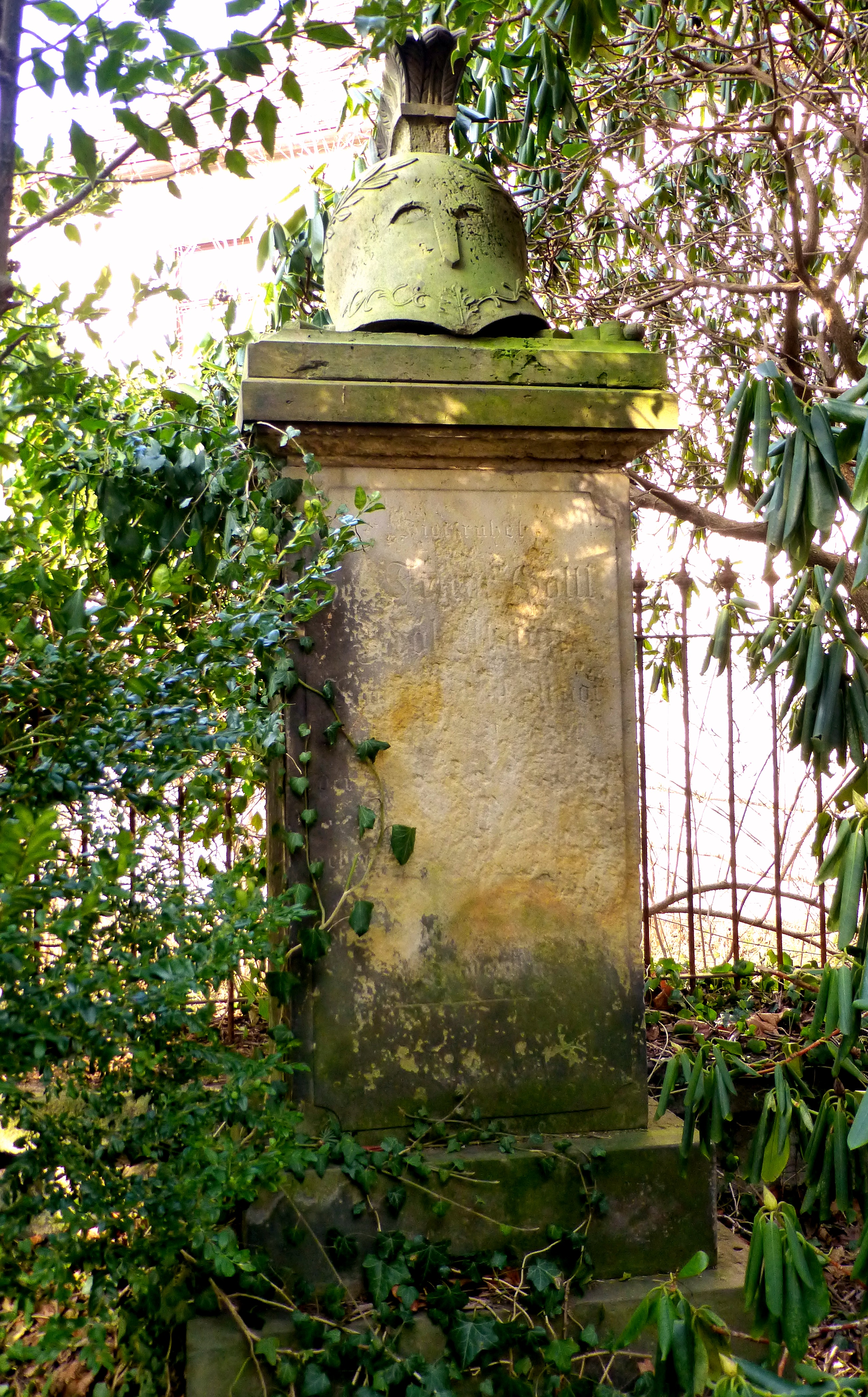 Ehrenmal (Grabmal mit Gruft) für den Major Friedrich Gottlieb Probsthain, Kommandant der Königl. Sächs. Brigade der Reitenden Artillerie Radeberg, Ritter der Königl. Franz. Ehrenlegion. Eingeweiht am 9. November 1839 auf dem Kirchhof Radeberg.